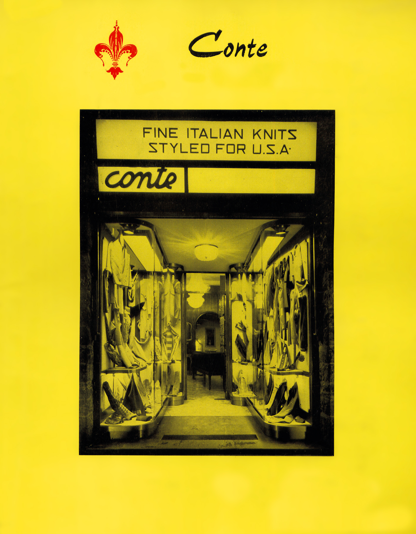 Prima sede Con.T.E.